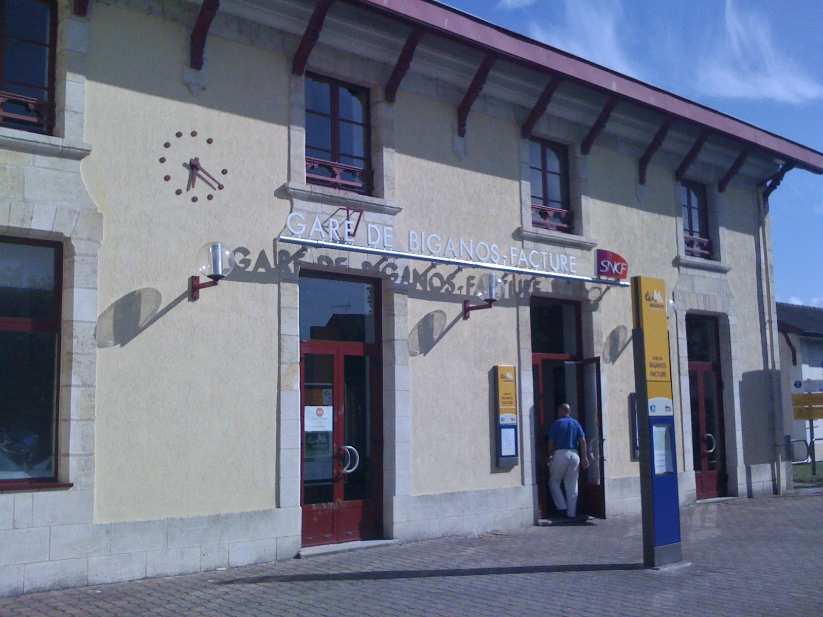 Gare SNCF de Biganos-Facture (33)